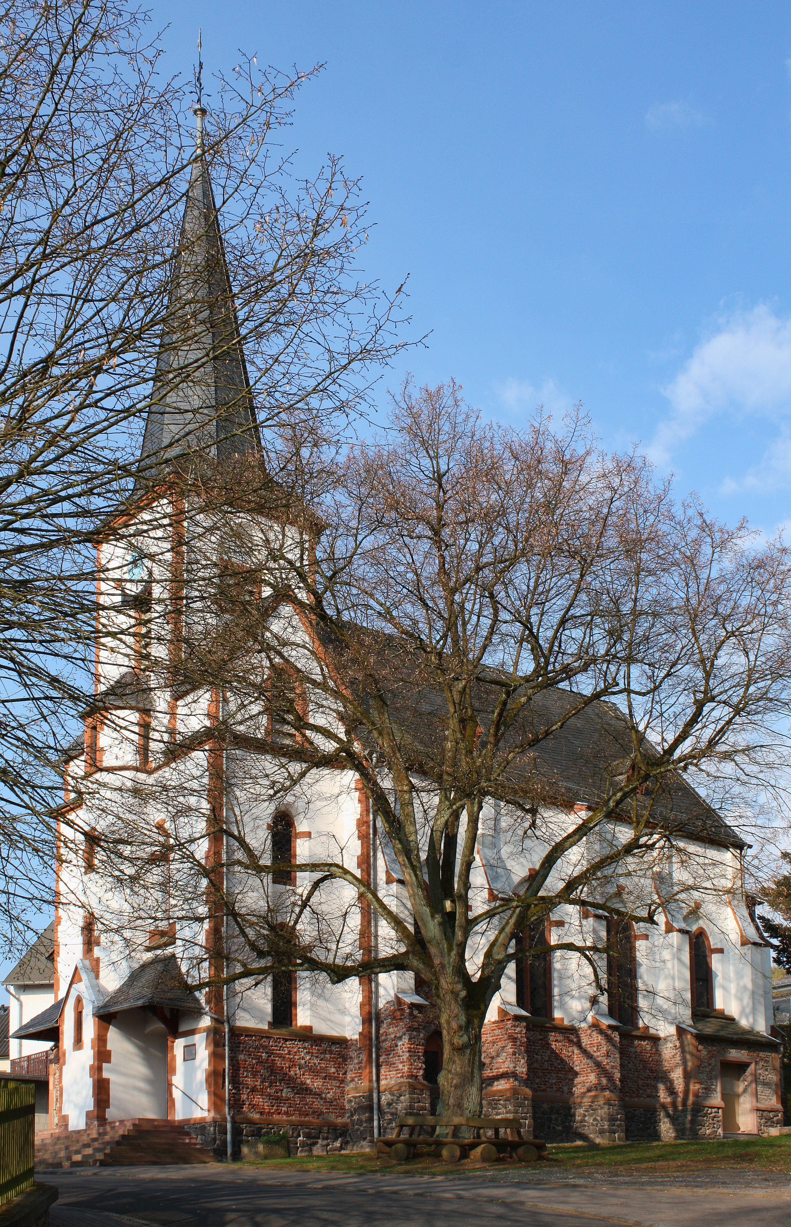 Kirche, Hirschberg an der Lahn, Germany